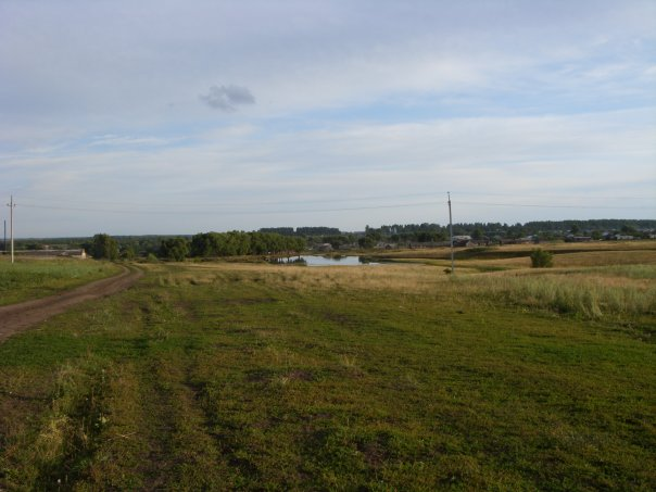 Озеро близ фермы в Климово Ибресинского района